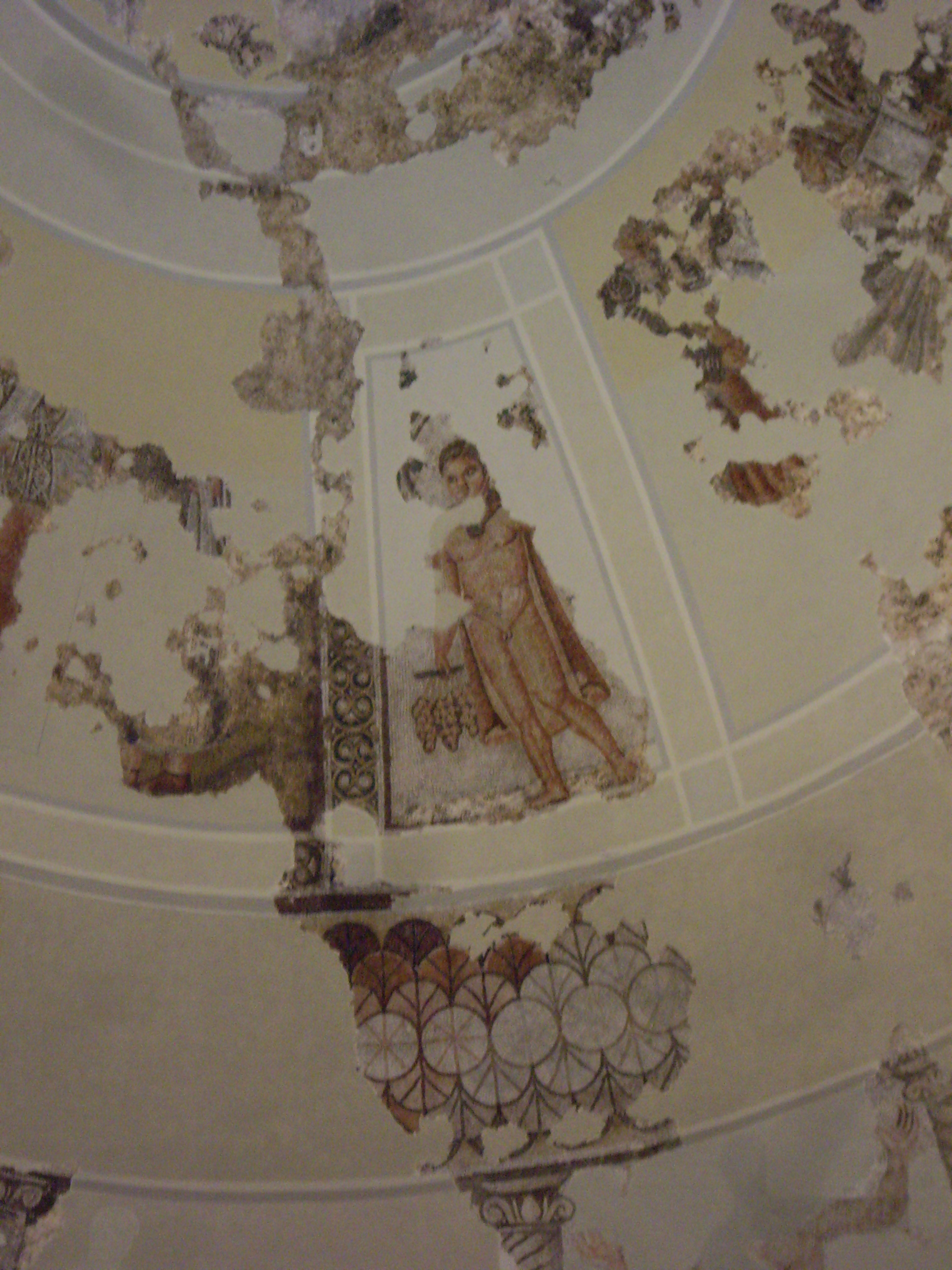 Representació de la tardor al Mausoleu de Centcelles, Catalunya.